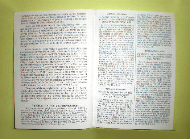 Textos del libro Examinando las Escrituras diariamente 2009.